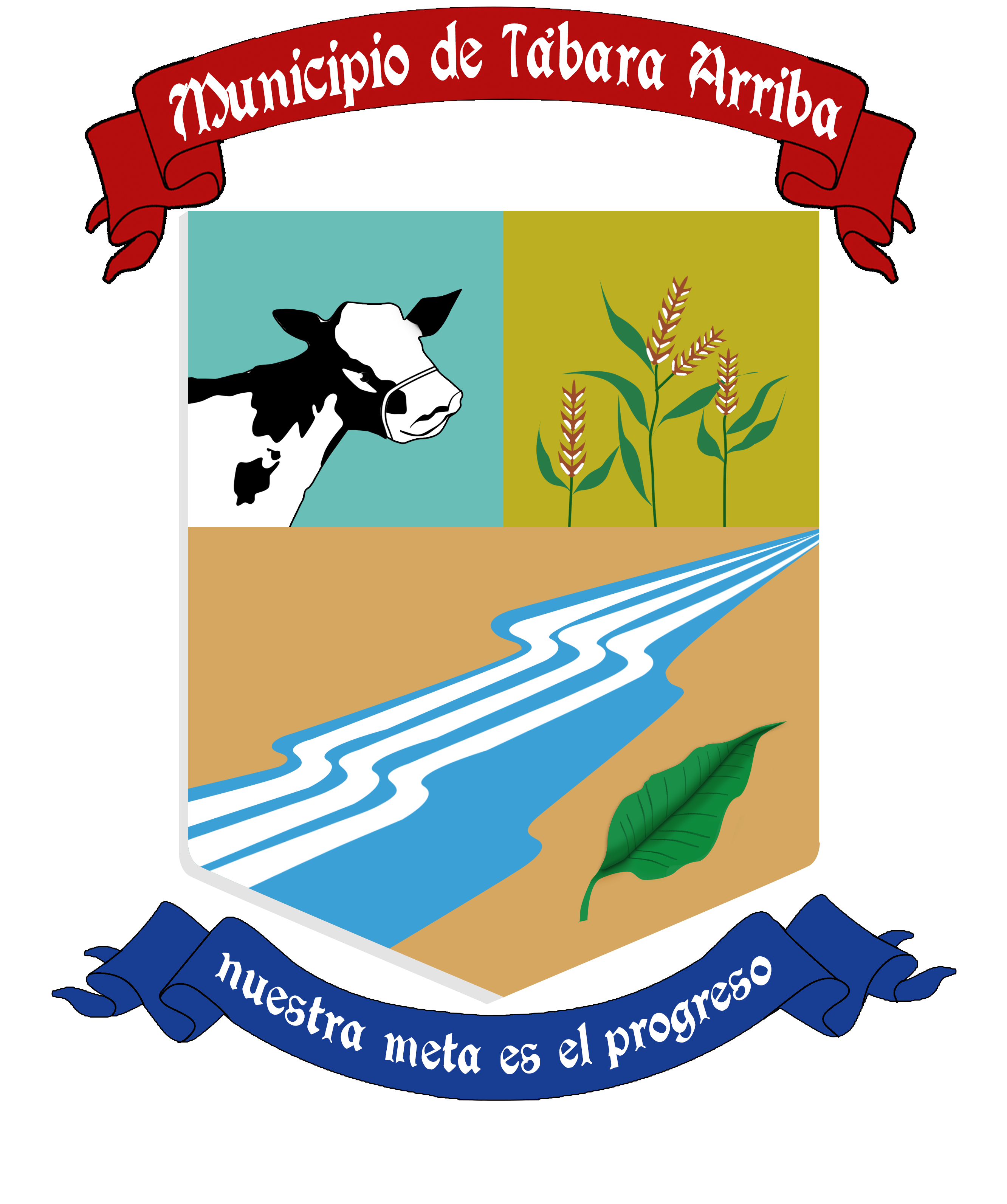 Escudo del municipio de Tábara Arriba, Azua, República Dominicana